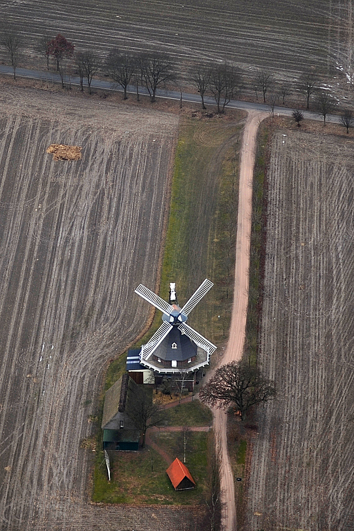 Fotoflugkurs Cuxhaven 2013: Mühle in Grefenmoor